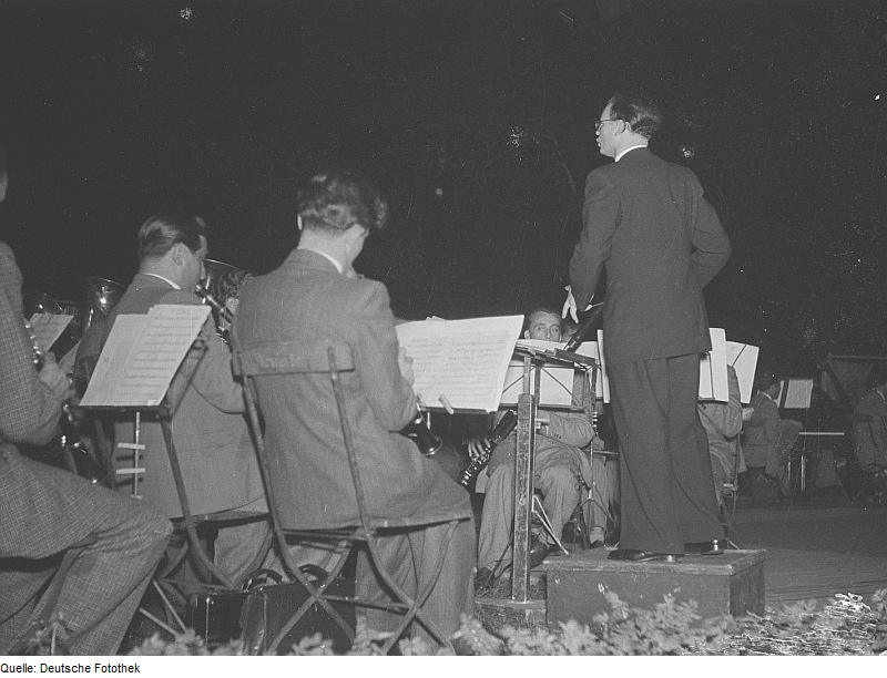 Original image description from the Deutsche FotothekAuftritt des Orchesters des Senders Leipzig